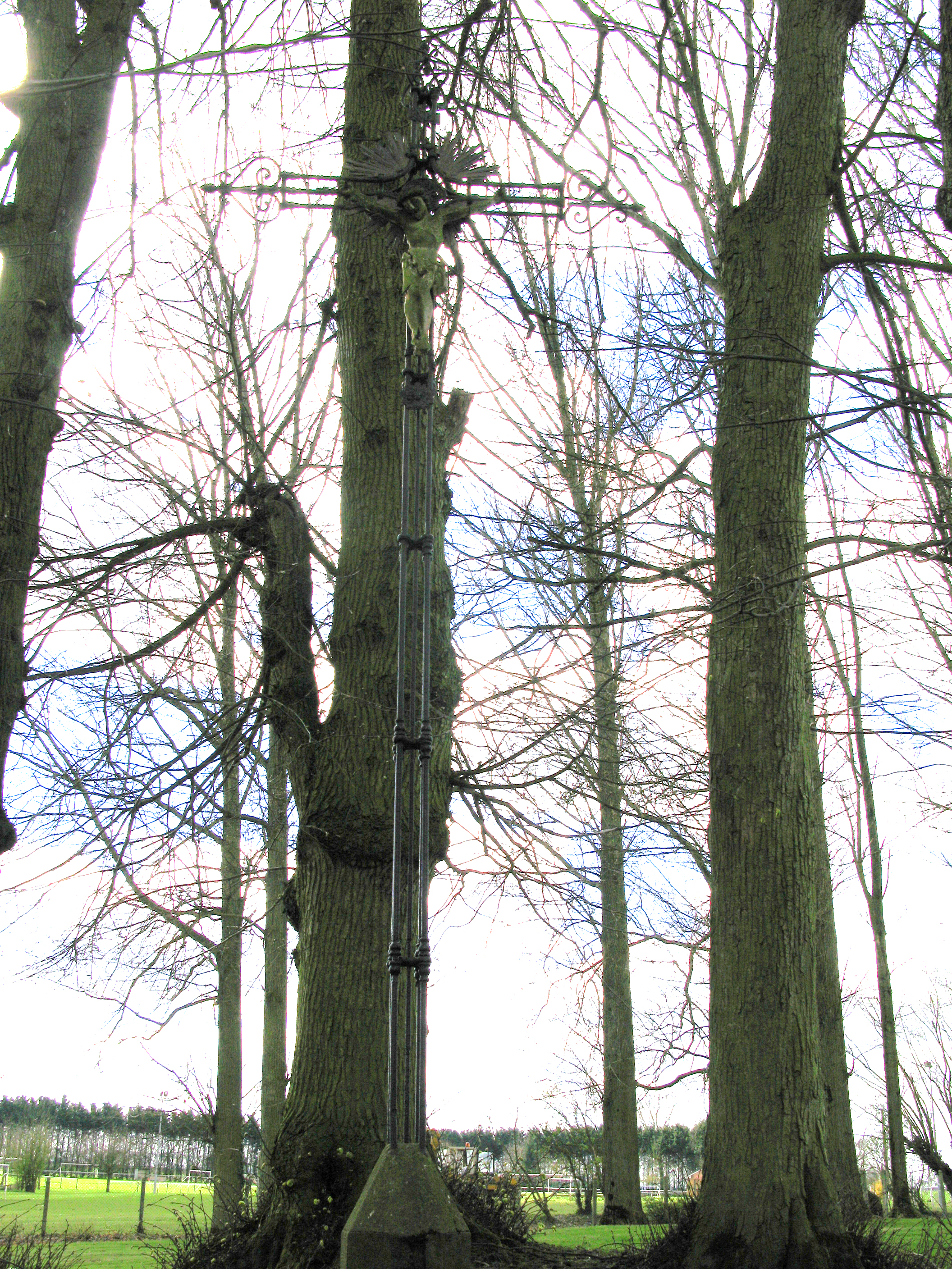 Englebelmer (Somme, France) - Le calvaire, dressé sur sa petite butte, est caché par les arbres, devant le stade, au Sud du village.